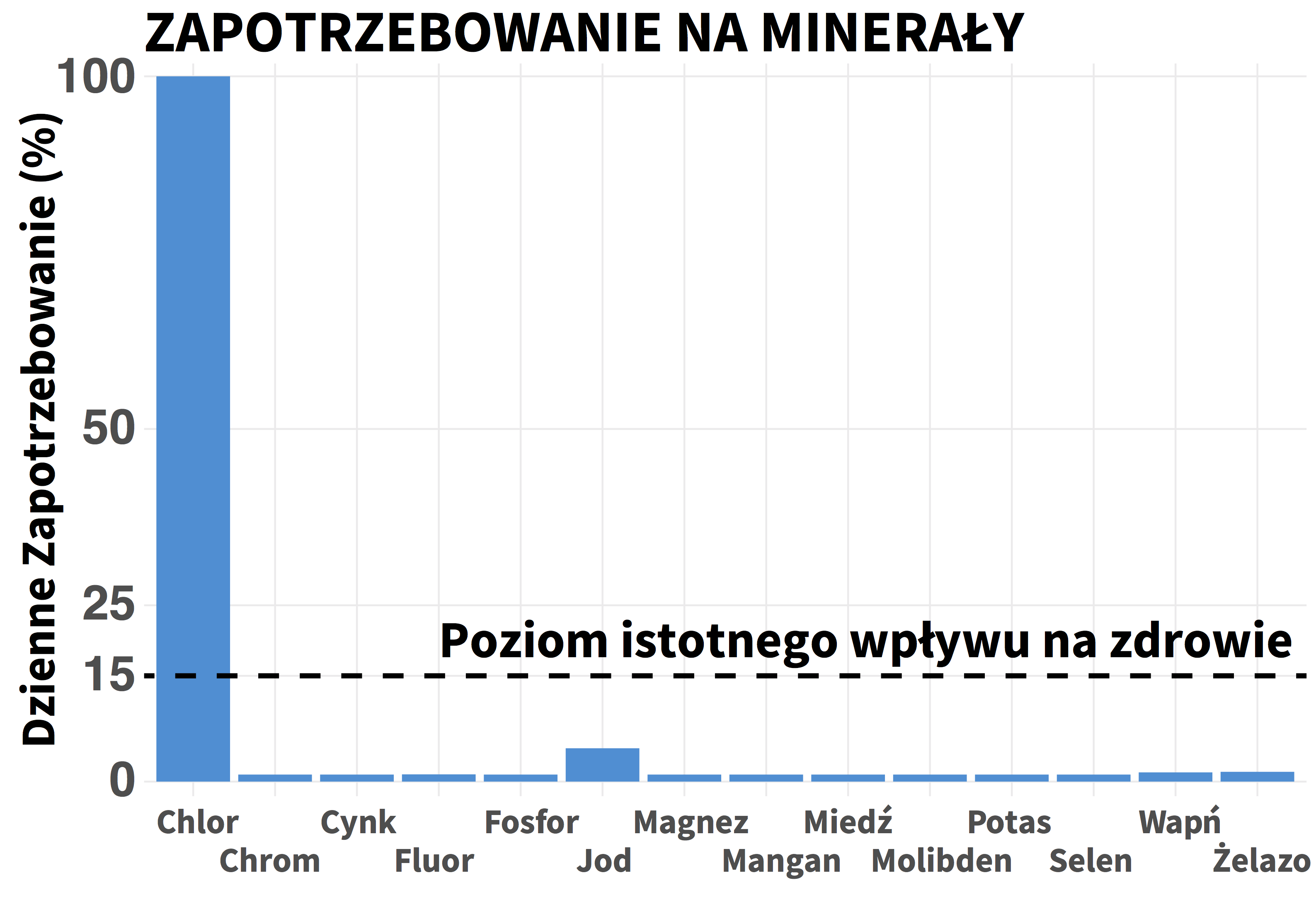 Zawartosc mineralow w soli himalajskiej